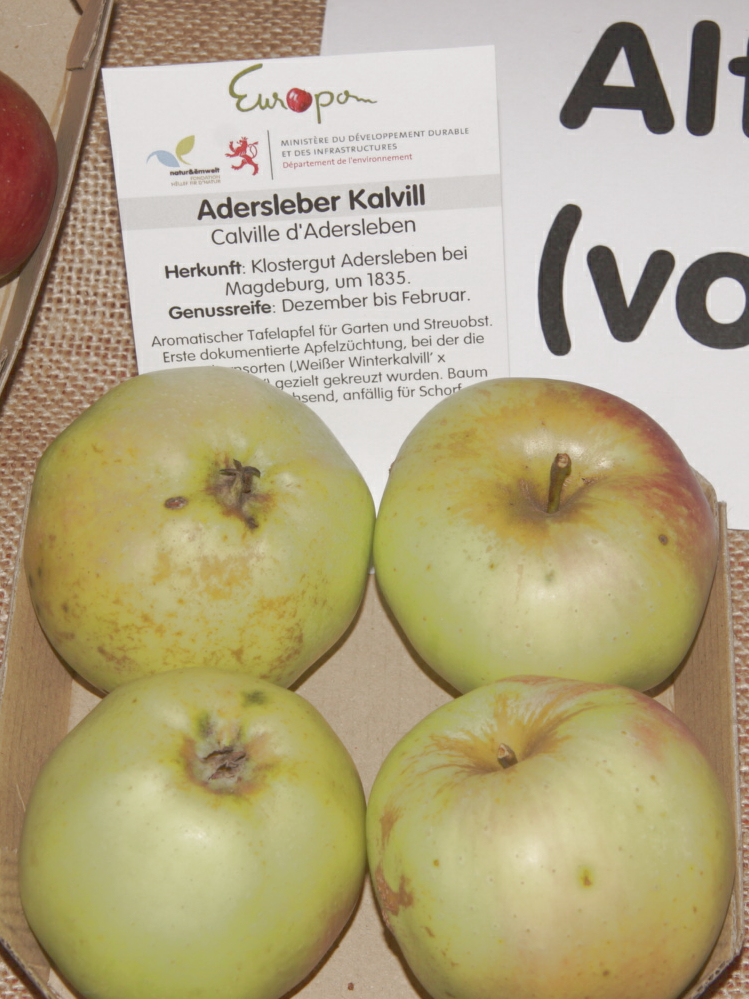 Calville d'Adersleben